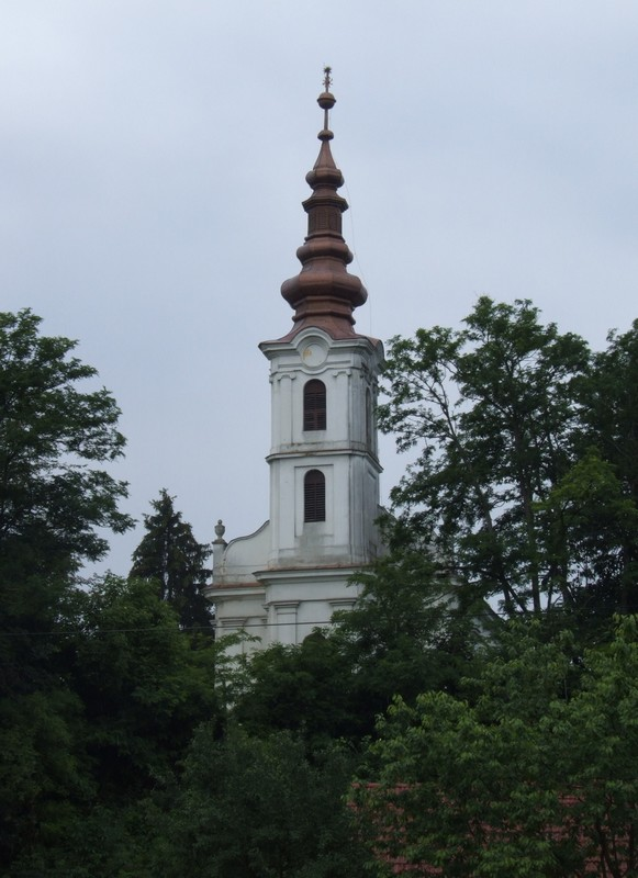 A galamboki református templom távolabbról fényképezve